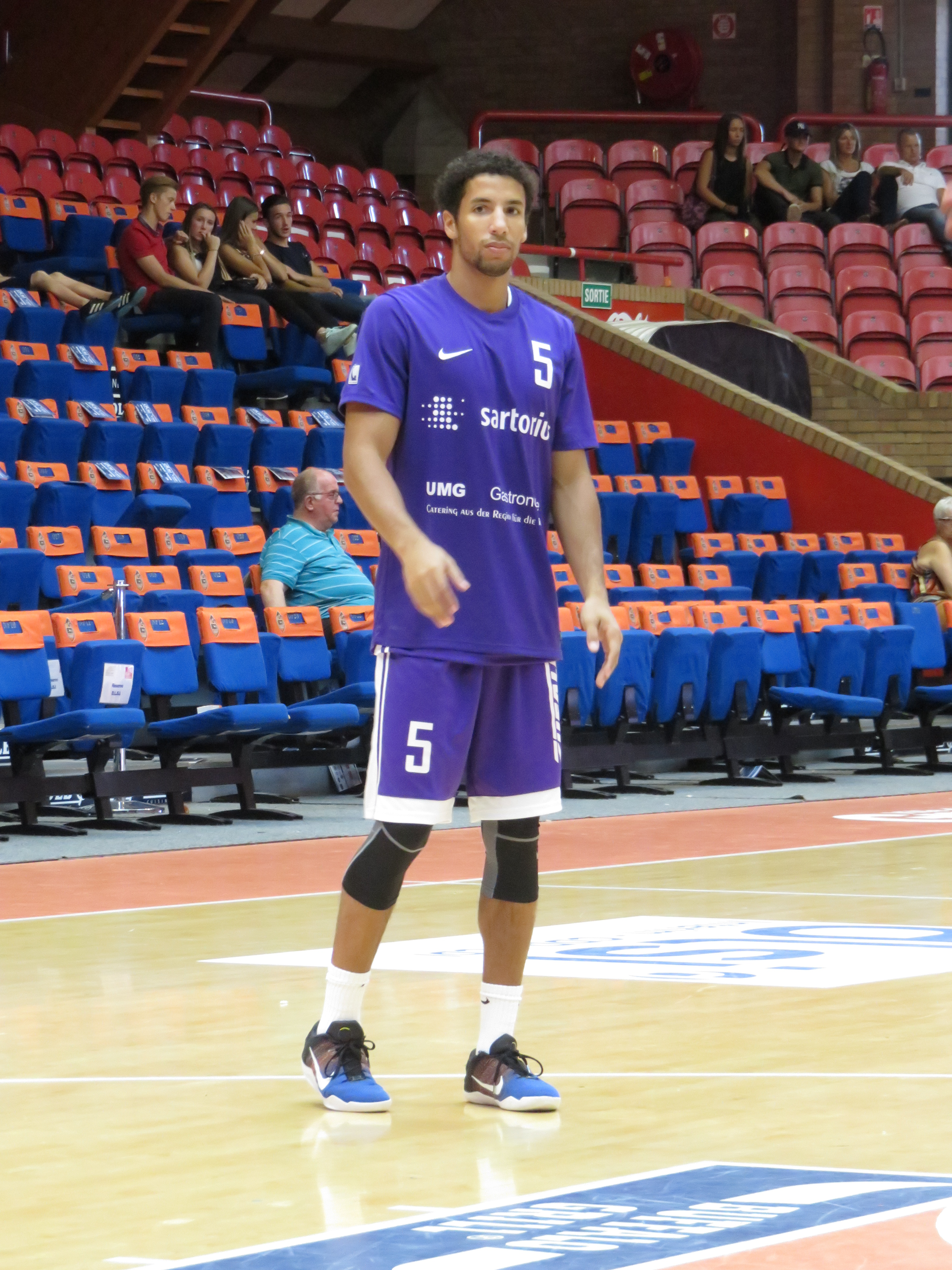 5 Leon Williams